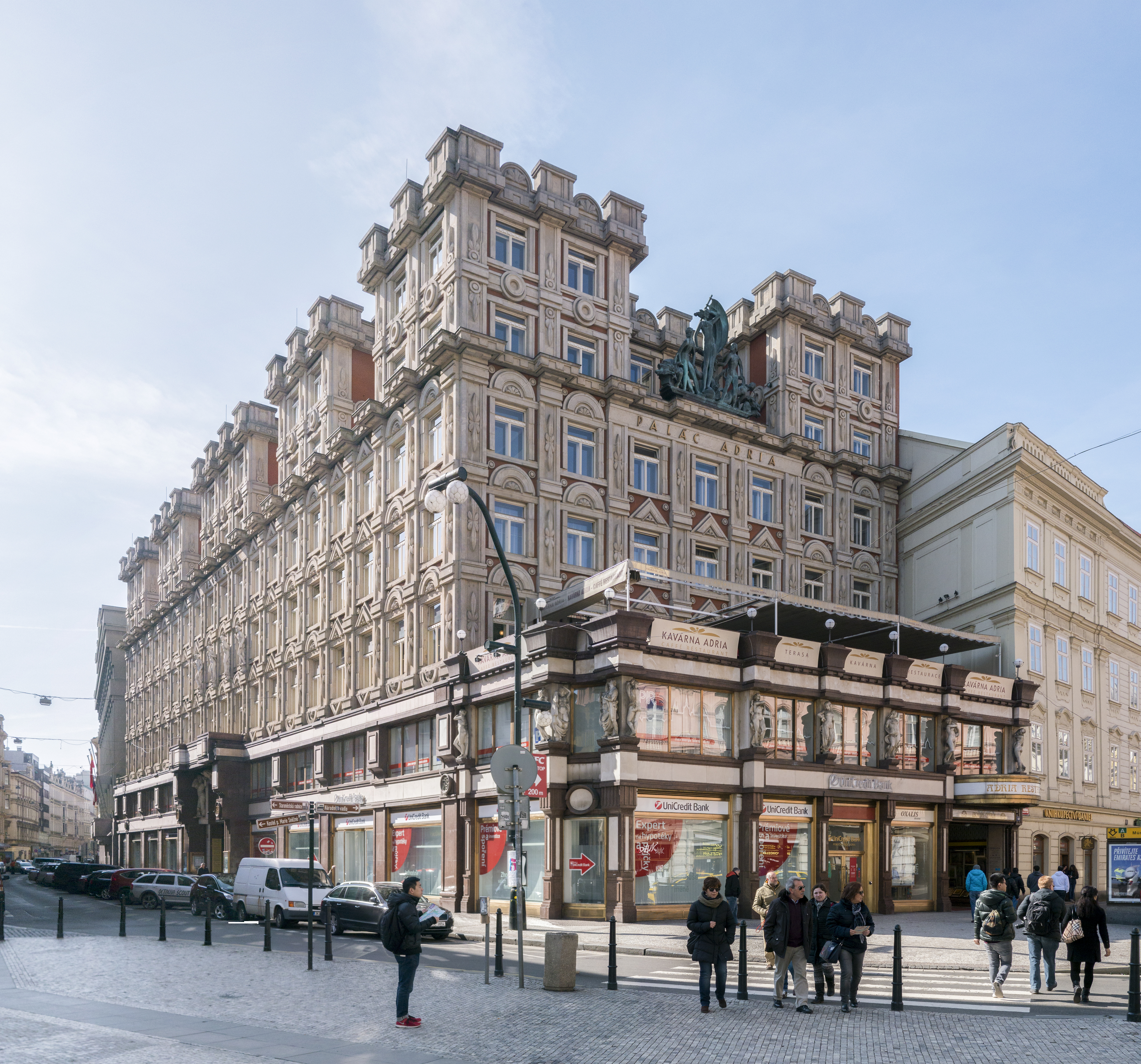 Adria Palace